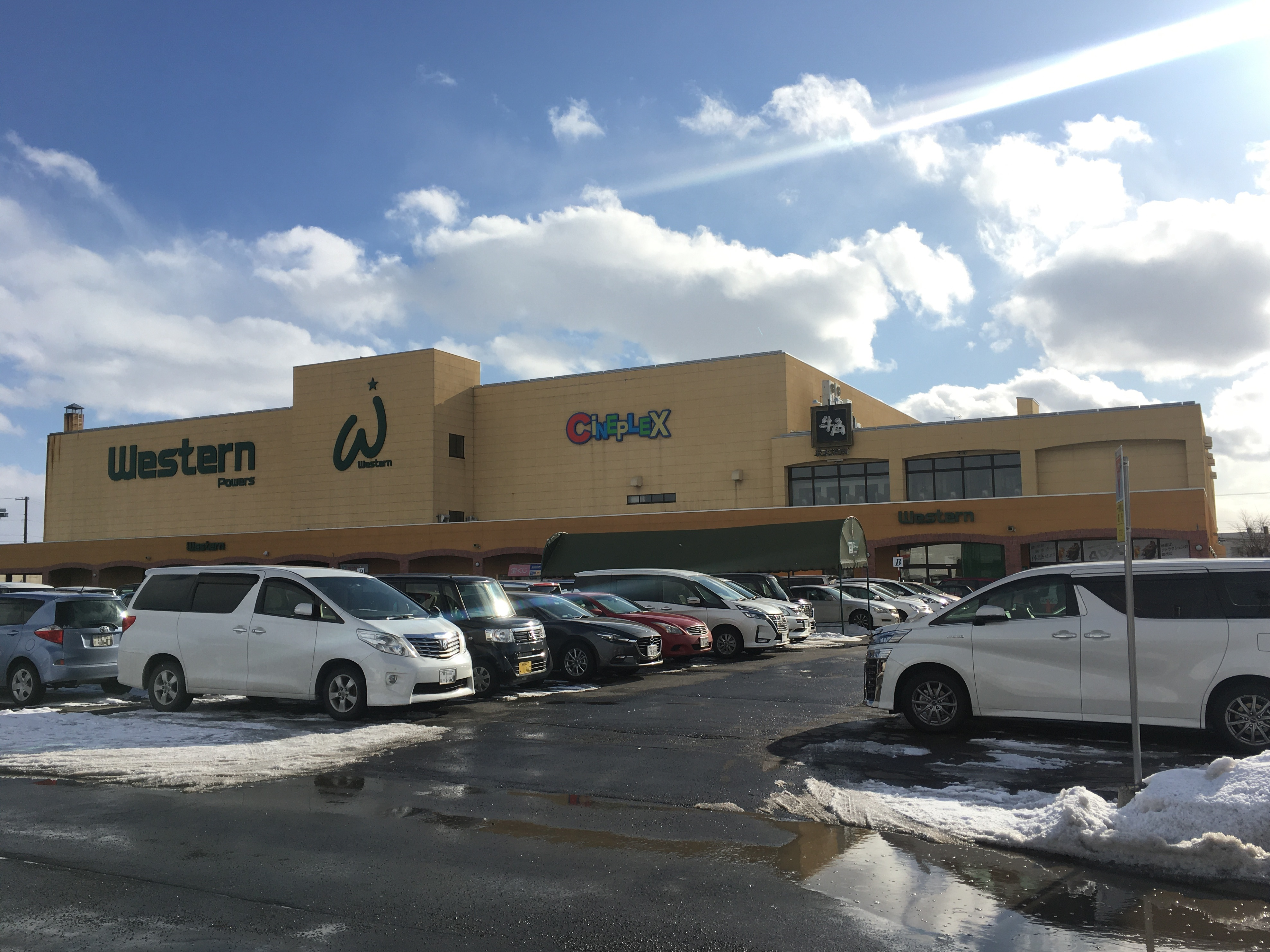 ウエスタンパワーズ・シネプレックス旭川（旭川市）